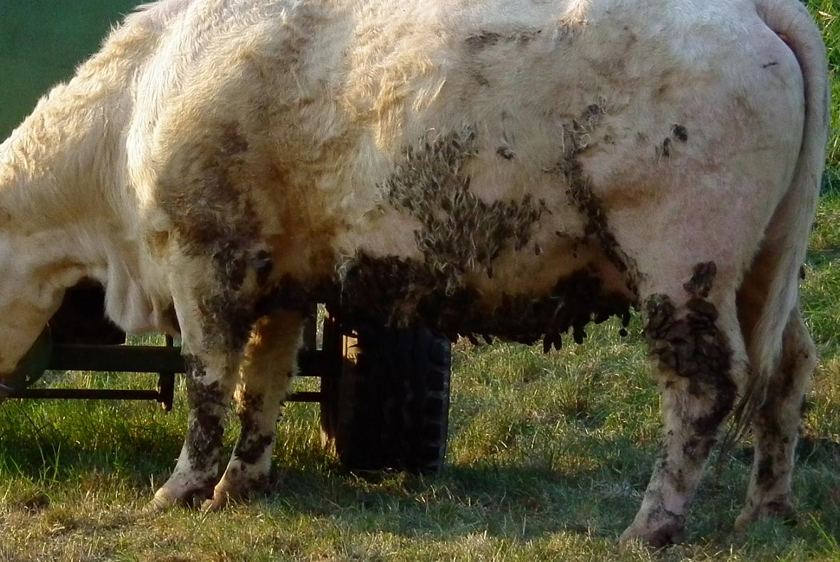 Aragonés: Cazcarrias en o cuerpo d'una vaca.